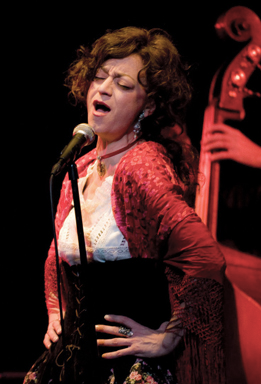 CarmenParis